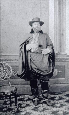 Imperador Pedro II em Porto Alegre em 1865.